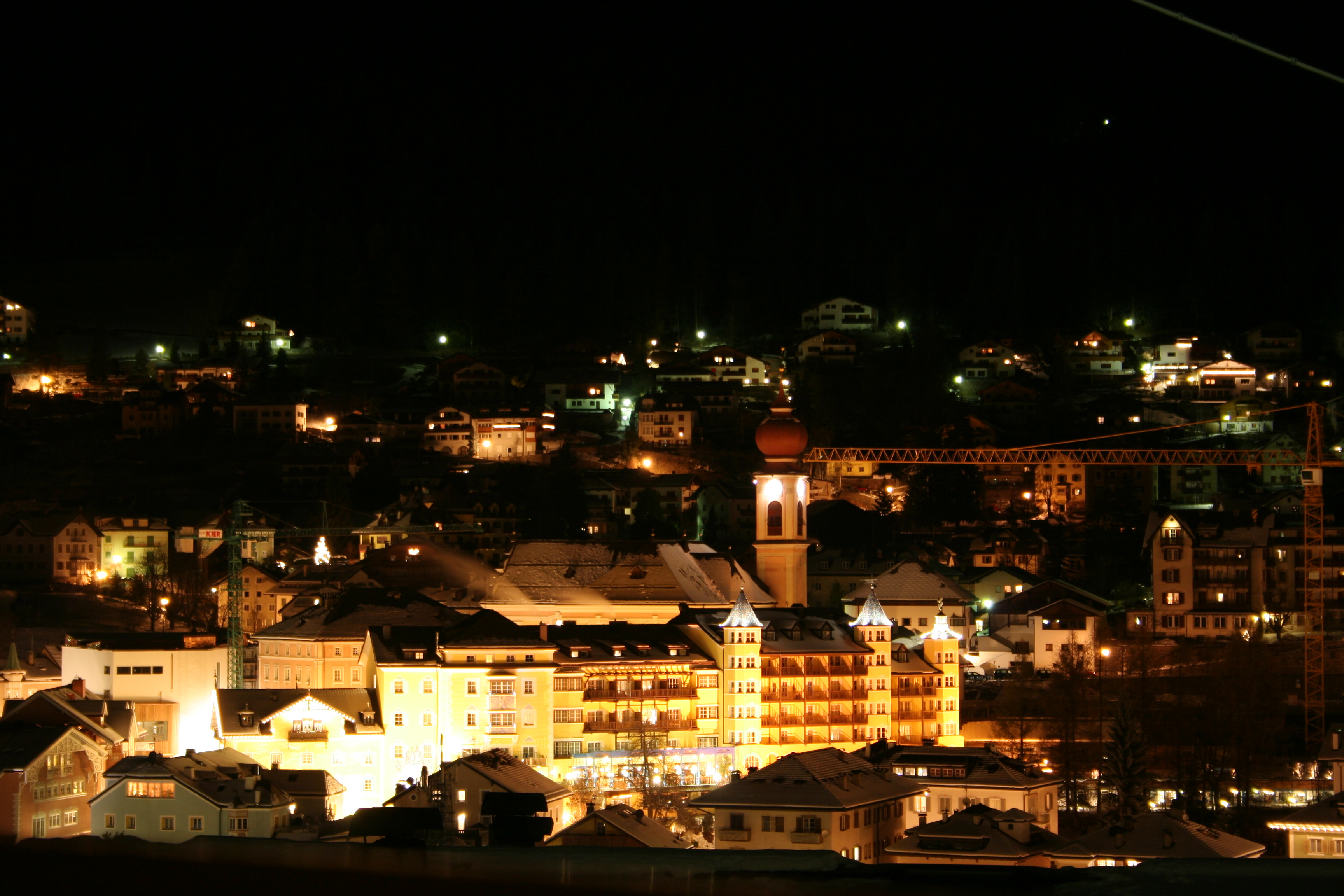 Ortszentrum von St. Ulrich.